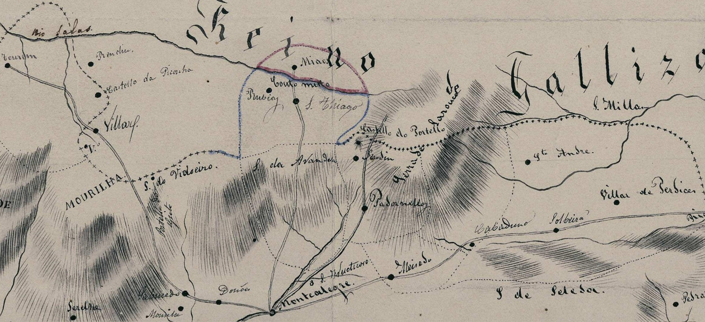 "Anexo Nº 3 pertenecete. al despº Nº 34 de 2n. de Sete. 1856". Fronteia entre España e Portugal e mailo Couto Mixto. Detalle do Couto Mixto.